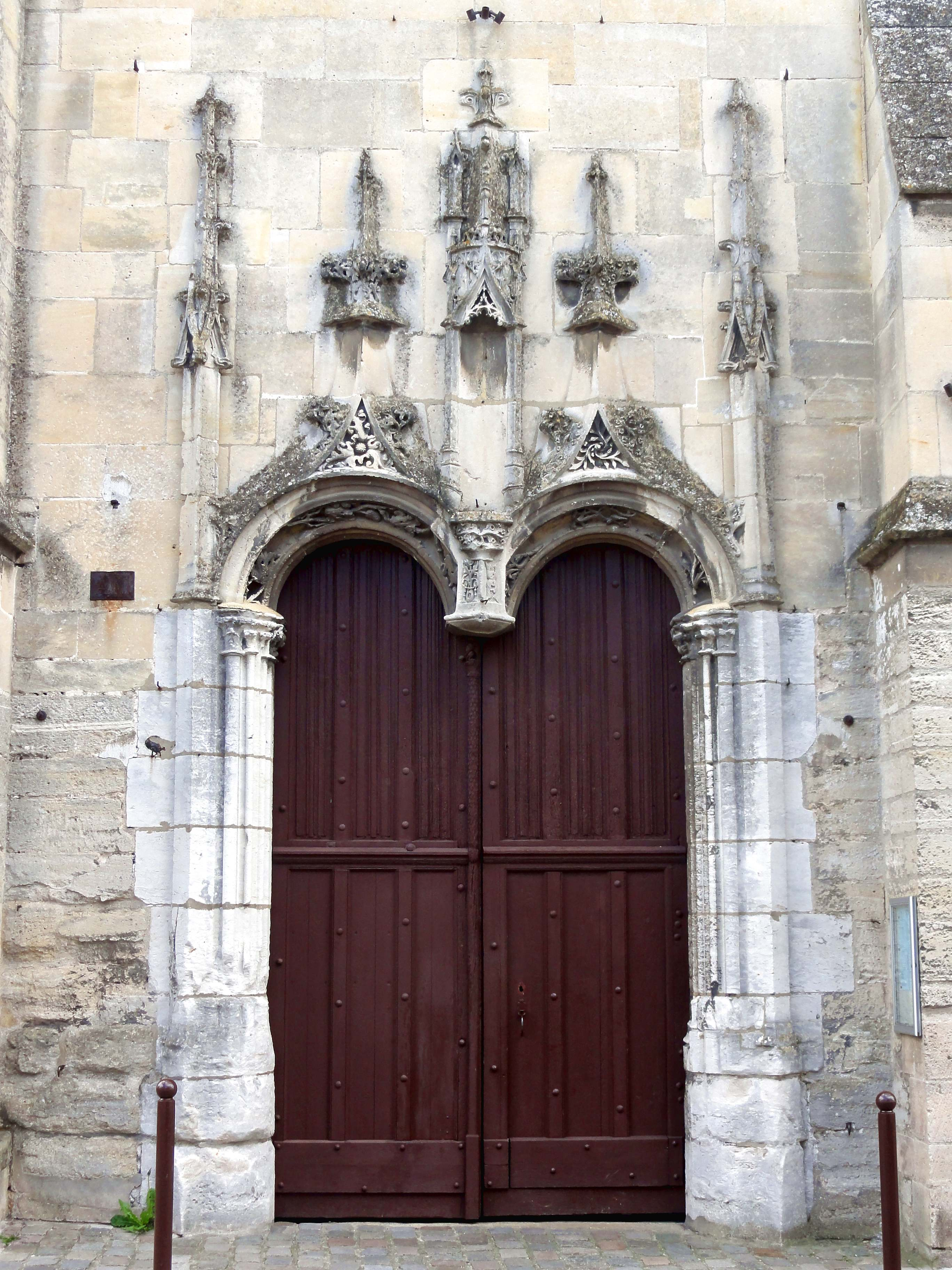 Église Saint-Aubin de Limay - voir titre.